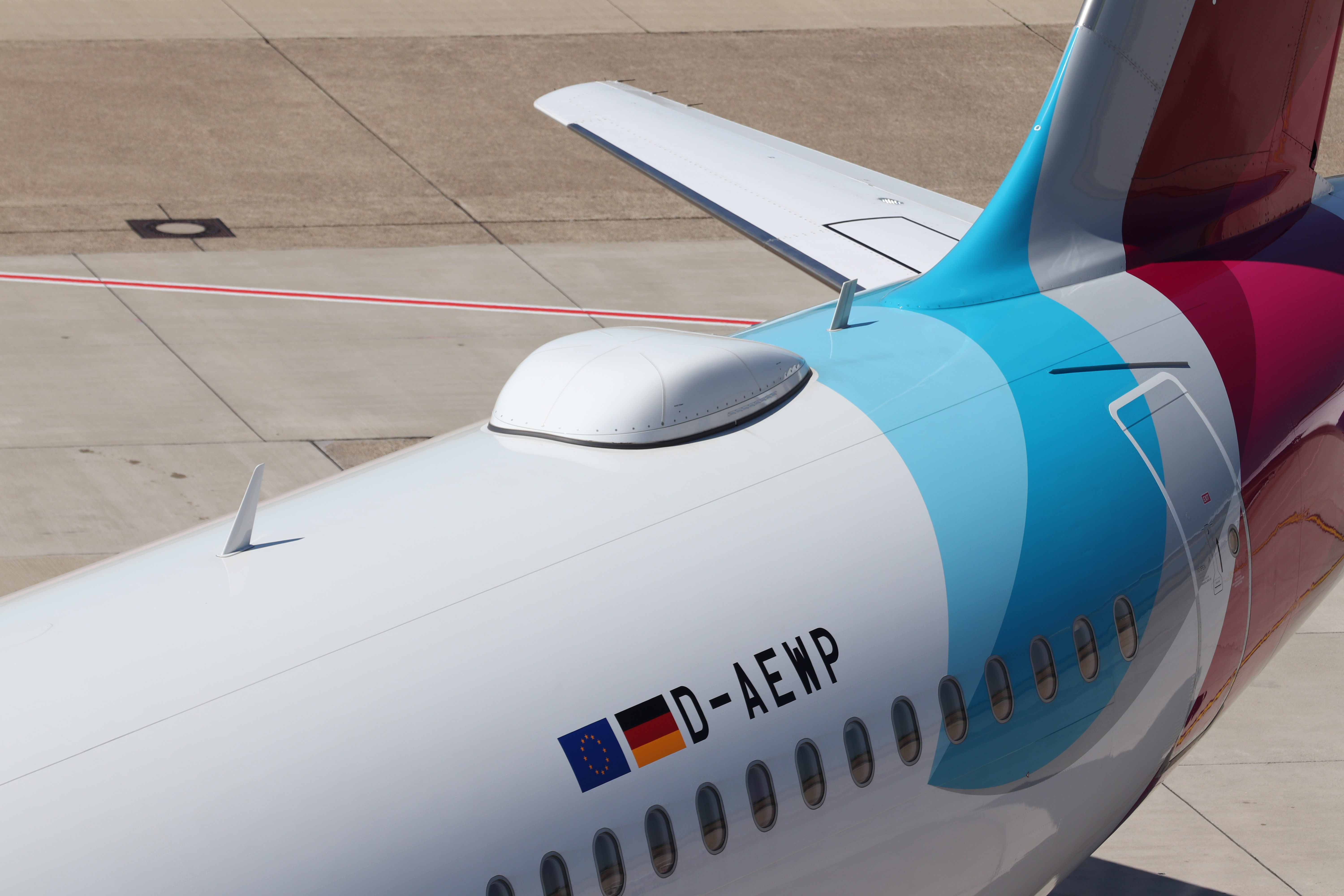 FlyNet-Antenne auf einem Airbus A320 D-AEWP der Eurowings am Flughafen Düsseldorf.